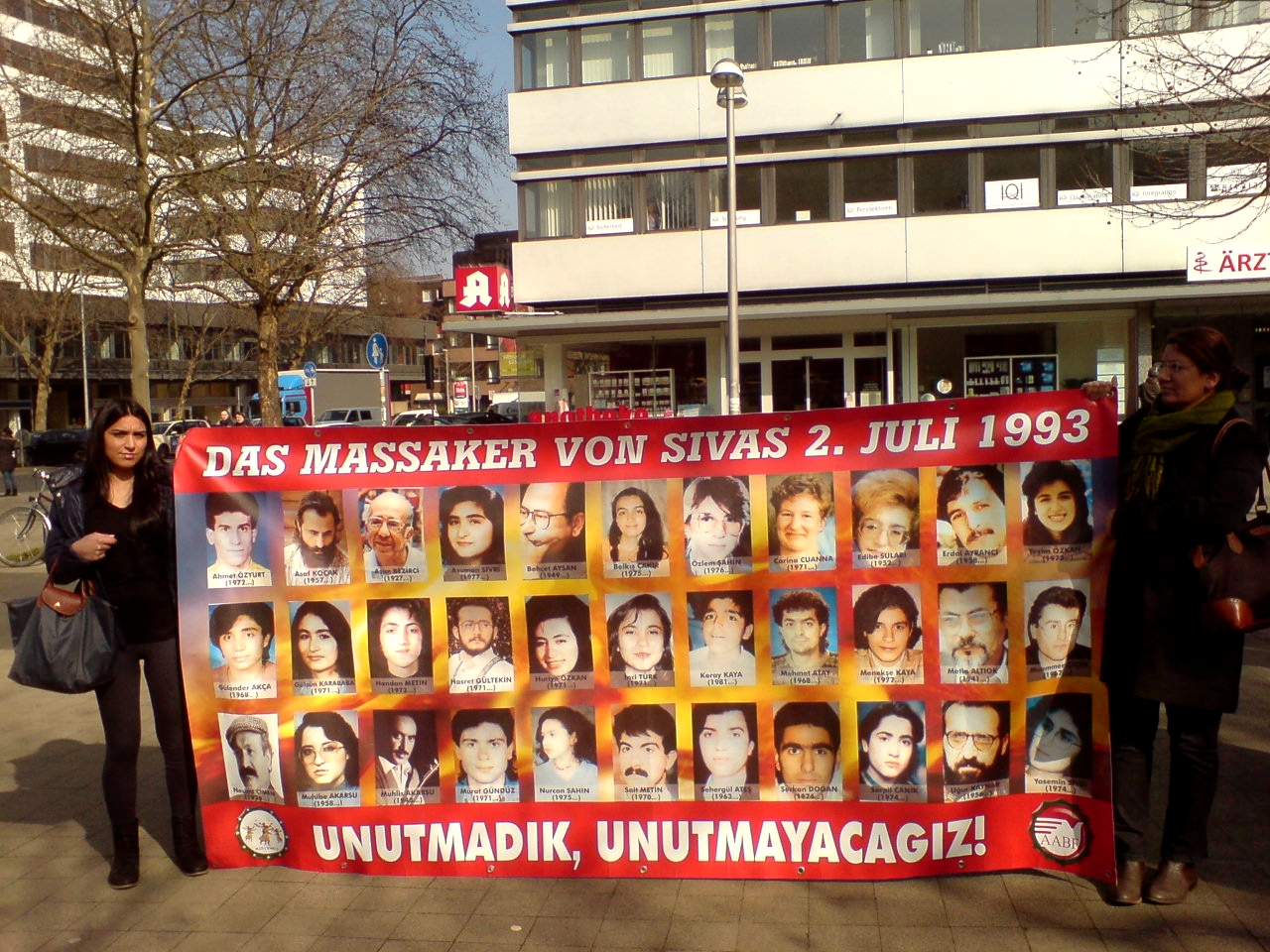 Transparent mit Fotos der Opfer vom Brandanschlag von Sivas vom 2. Juli 1993